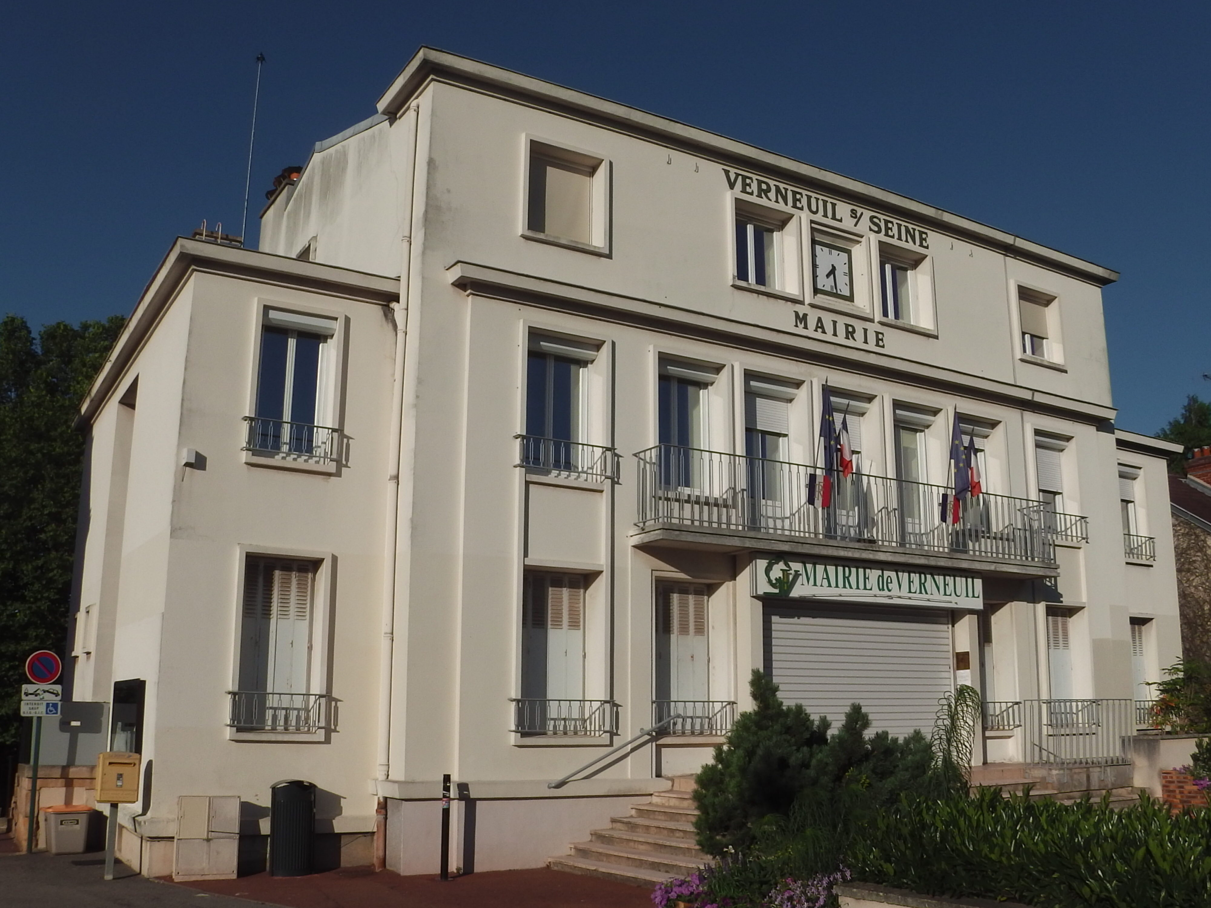 Mairie de Verneuil-sur-Seine